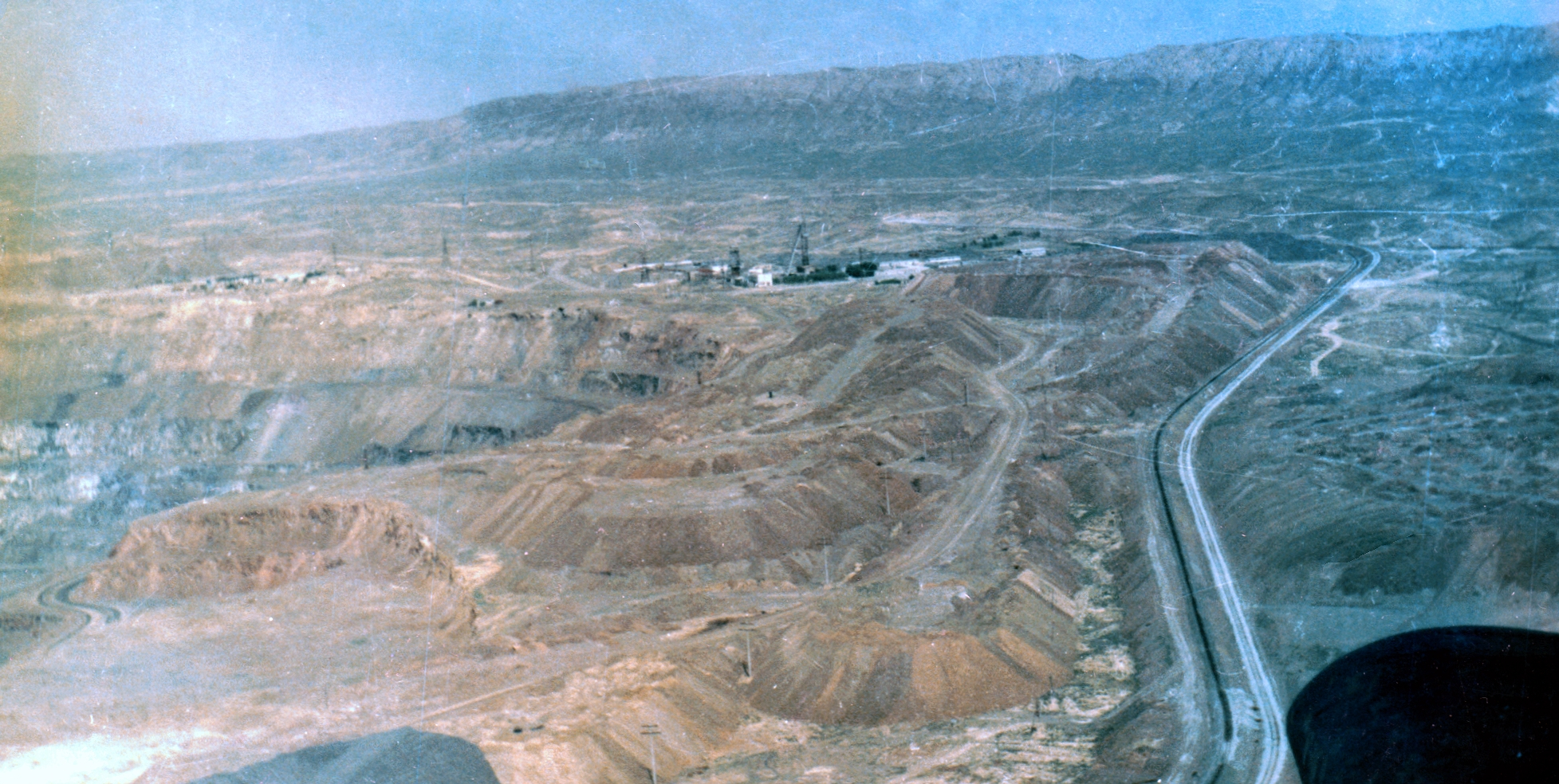 Карьер Мурунтау по добыче золота. 1988